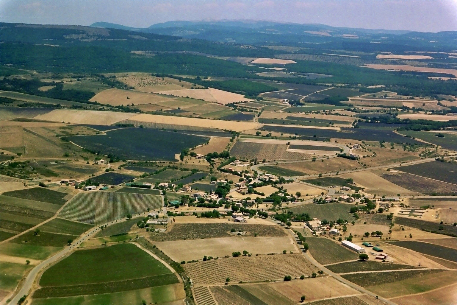 Vue aérienne du plateau d'Albion et du village de Ferrassières le 12.07.2003